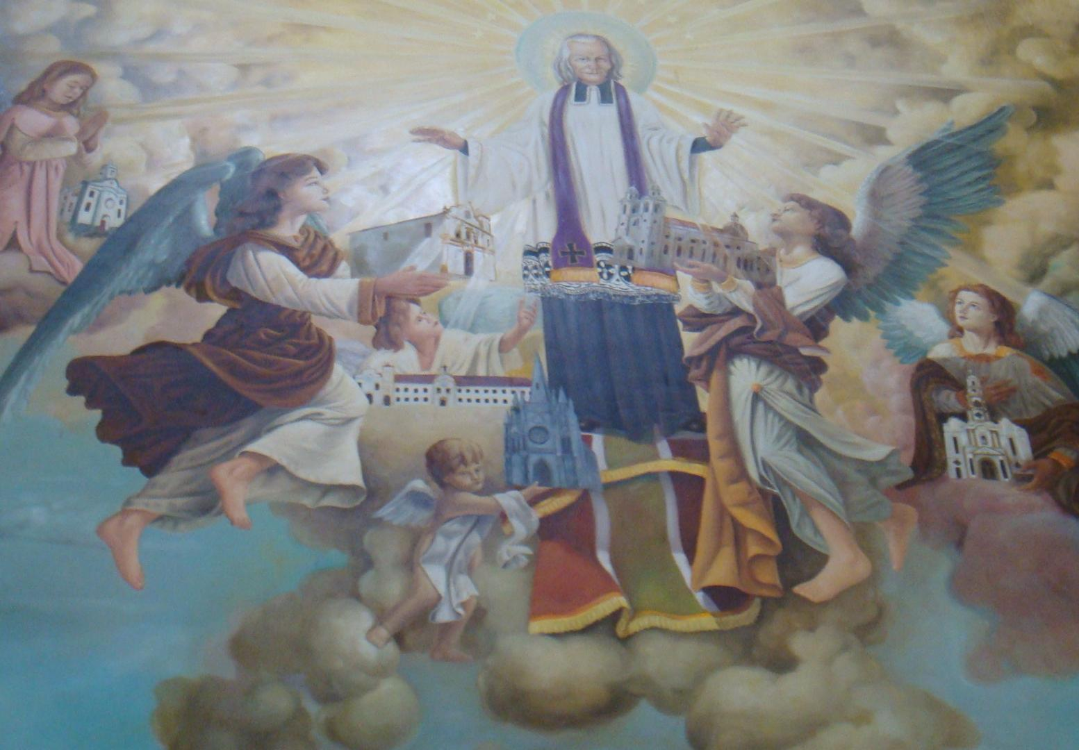 Afresco das paróquias da Administração São João Maria Vianney, todas já finalizadas, sendo trazidas por anjos para serem abençoadas por São João Maria Vianney, padroeiro da mesma, na parede esquerda do presbitério da "Igreja do Imaculado Coração de Nossa Senhora do Rosário de Fátima", sé da Administração pessoal, localizada na cidade de Campos dos Goytacazes, RJ, Brasil.